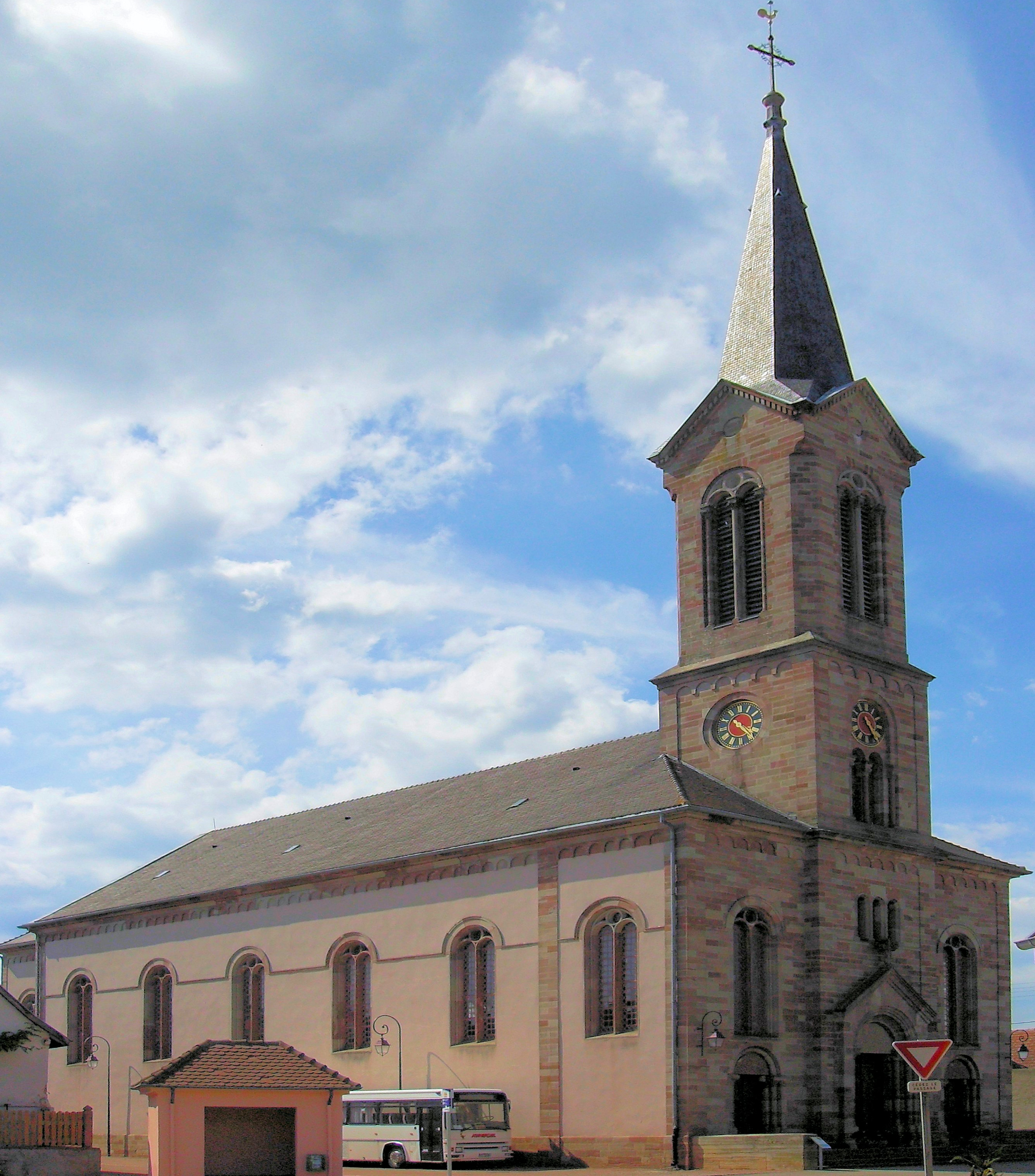 L'église Sainte-Lucie à Niederhergheim